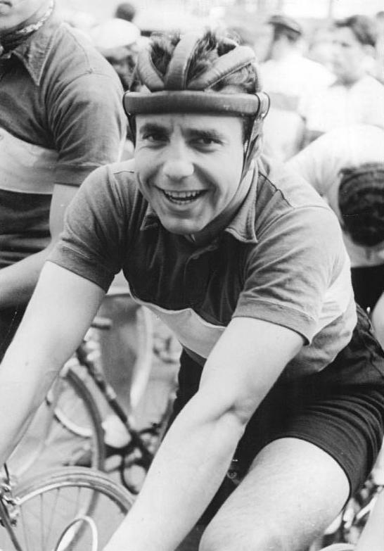 Roland Henning Zentralbild Schlegel 30.6.1956 Malitz siegte beim Schloßteichrennen Am Donnerstag, den 28.6.1956 , fand in Karl-Marx-Stadt das Schloßteichrennen 1956 statt. Sieger wurde Werner Malitz (Einheit Berlin), der die gesamte Spitzenklasse der DDR hinter sich lassen konnte. Der Verdiente Meister des Sports Gustav Adolf Schur musste sich mit dem neunten Platz zufrieden geben. UBz: Roland Henning (SC Wissenschaft DHfK Leipzig) vor dem Start.